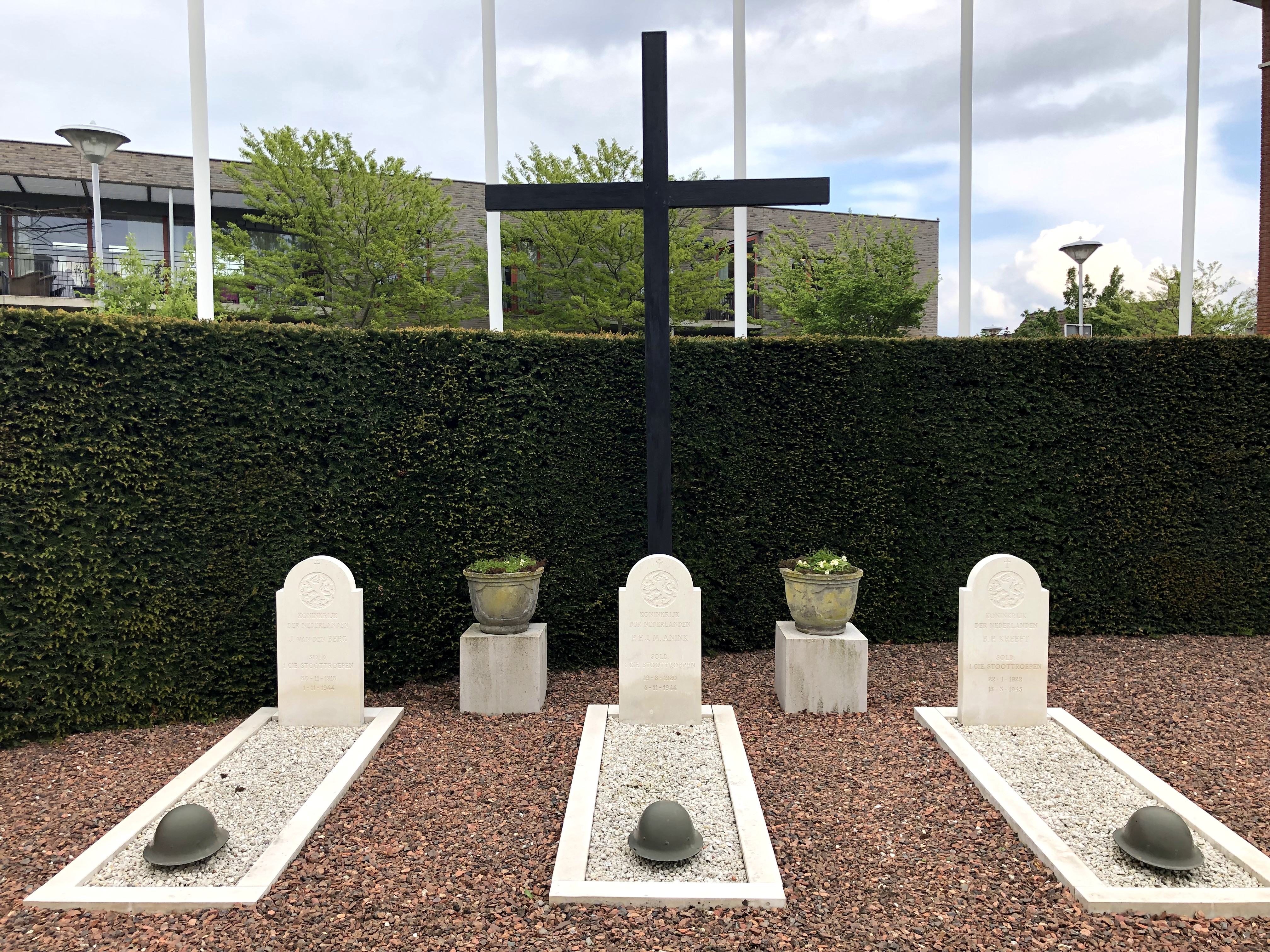 Deze drie graven zijn van de aller eerste gevallen Stoters van de 1e Compagnie Stoottroepers. Tijdens de Tweede Wereldoorlog zijn deze soldaten begraven in de toenmalige kloostertuin van huize St. Elizabeth. Deze zijn hier blijven liggen toen deze tuin tot ereveld van de Stoottroepers werd omgedoopt. De drie graven vertegenwoordigen ook de graven van alle 375 gevallen Stoters die tijdens operaties na 1945 zijn omgekomen.